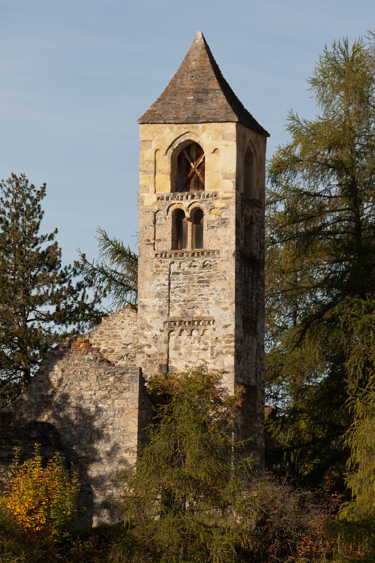 Kirchenruine Sankt Peter (Baselgia S. Peder) in Sent im Unterengadin (GR)